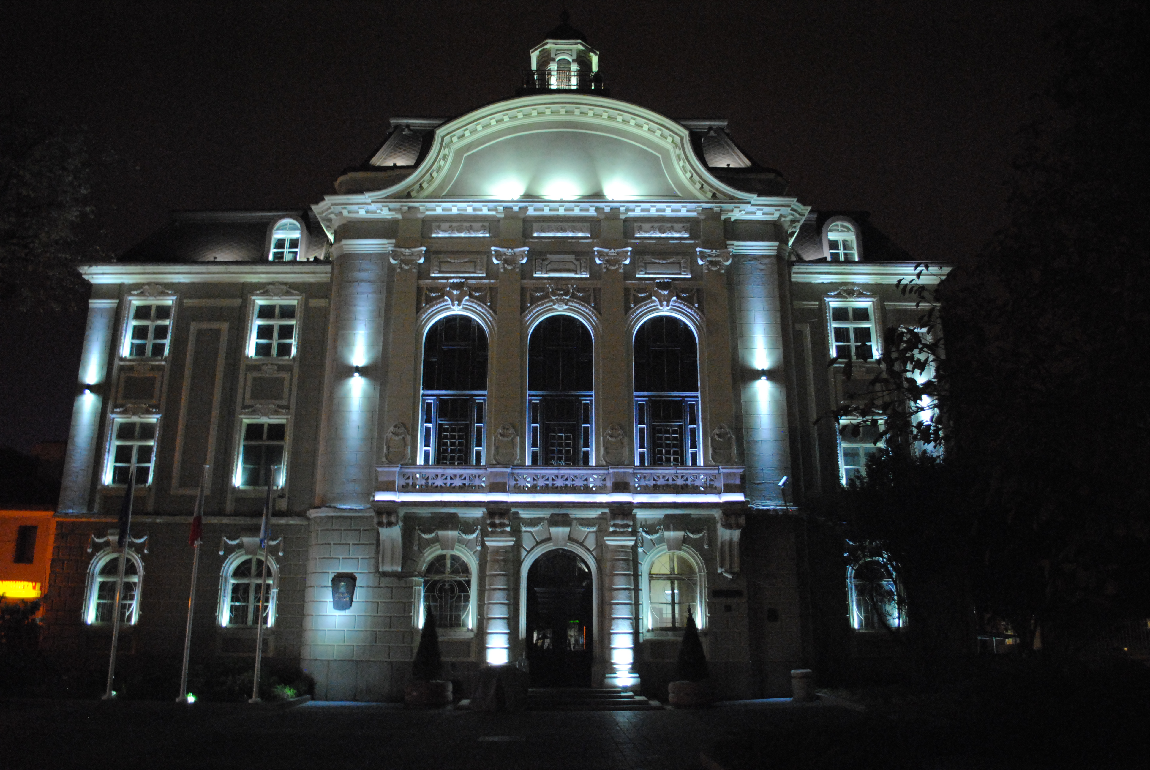 Община Пловдив, България